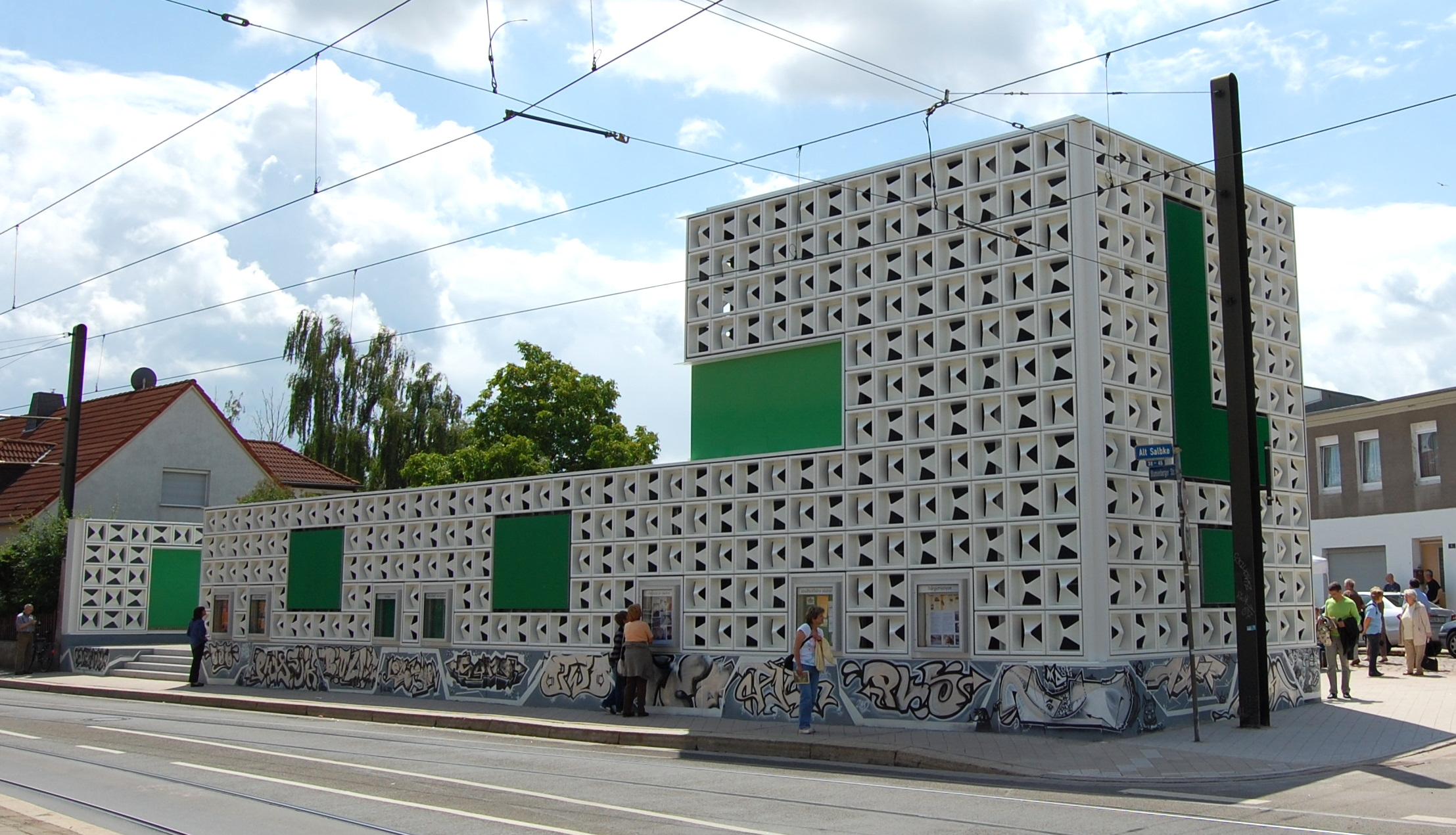 Lesezeichen Salbke, Ostseite, Eröffnung